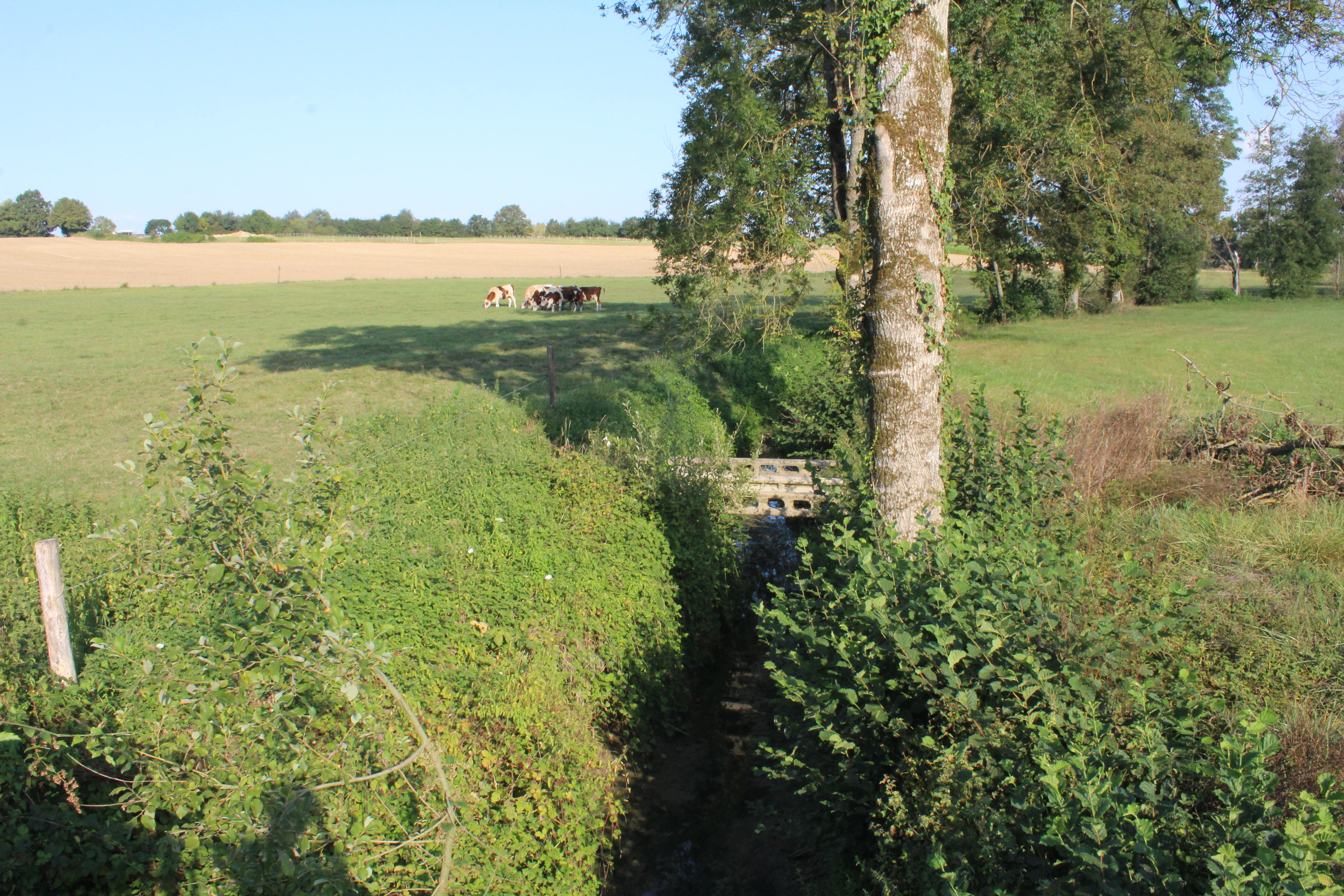 Ruisseau de la Loëze à Saint-Sulpice près de la frontière avec Saint-Didier-d'Aussiat.